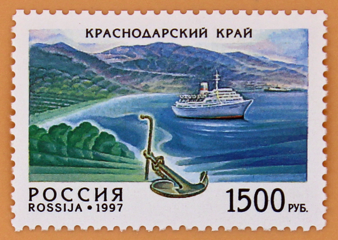 Почтовая марка России - 1997, Серия "Регионы", Краснодарский край